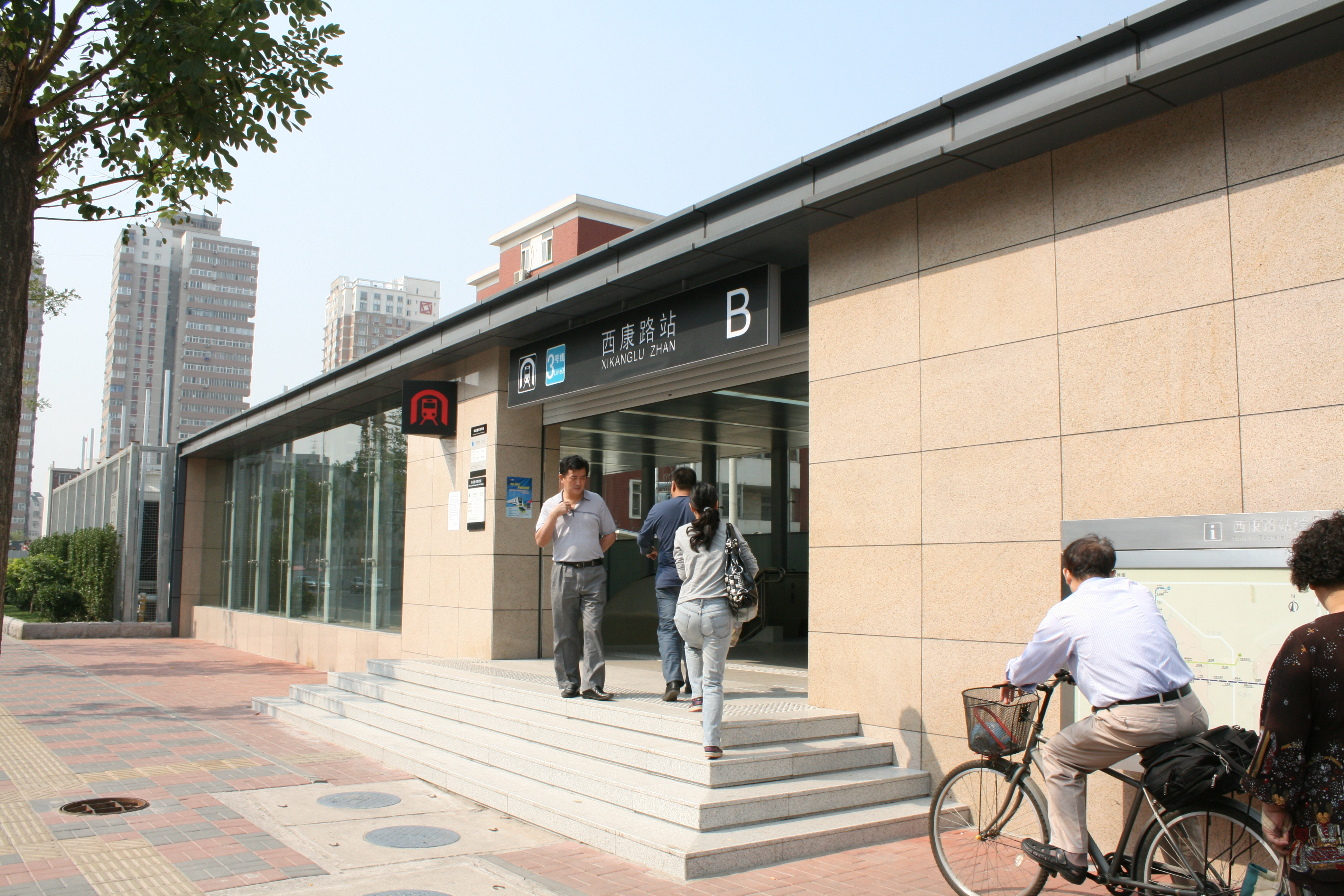 天津地鐵三號線西康路站B出口